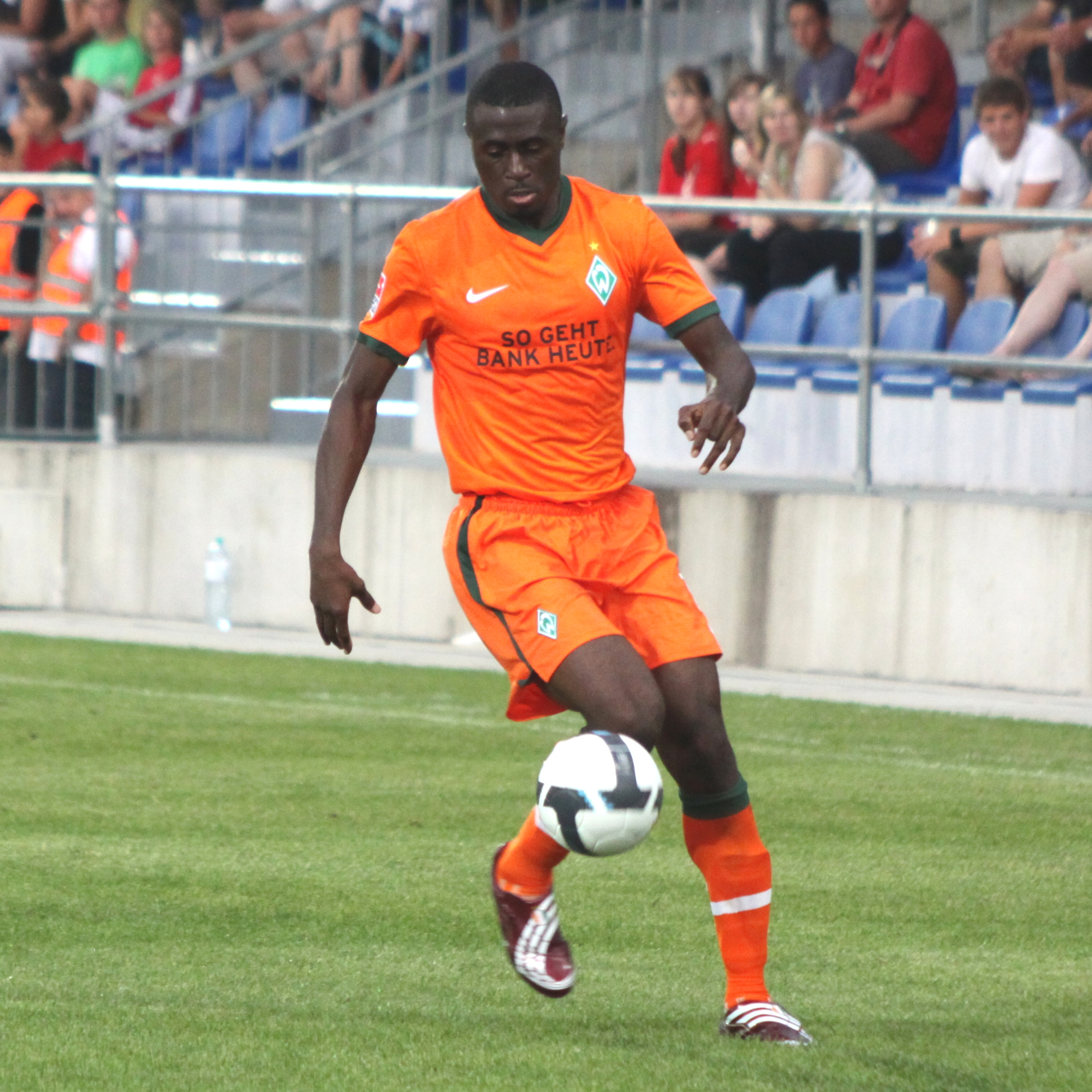 Boubacar Sanogo - SV Werder Bremen (4)